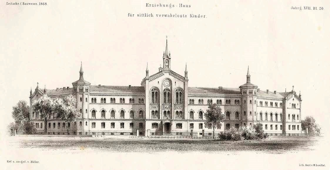 Erziehungshaus für sittlich verwahrloste Kinder am Urban, Berlin-Kreuzberg. Das Gebäude wurde nach Entwurf von Gustav Möller von 1863-1865 errichtet. Die Bauleitung hatte er anfangs selbst, später sein Stellvertreter Hermann Blankenstein